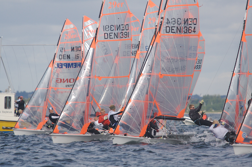 29'er på startlinjen til TORM i Aarhus 2007